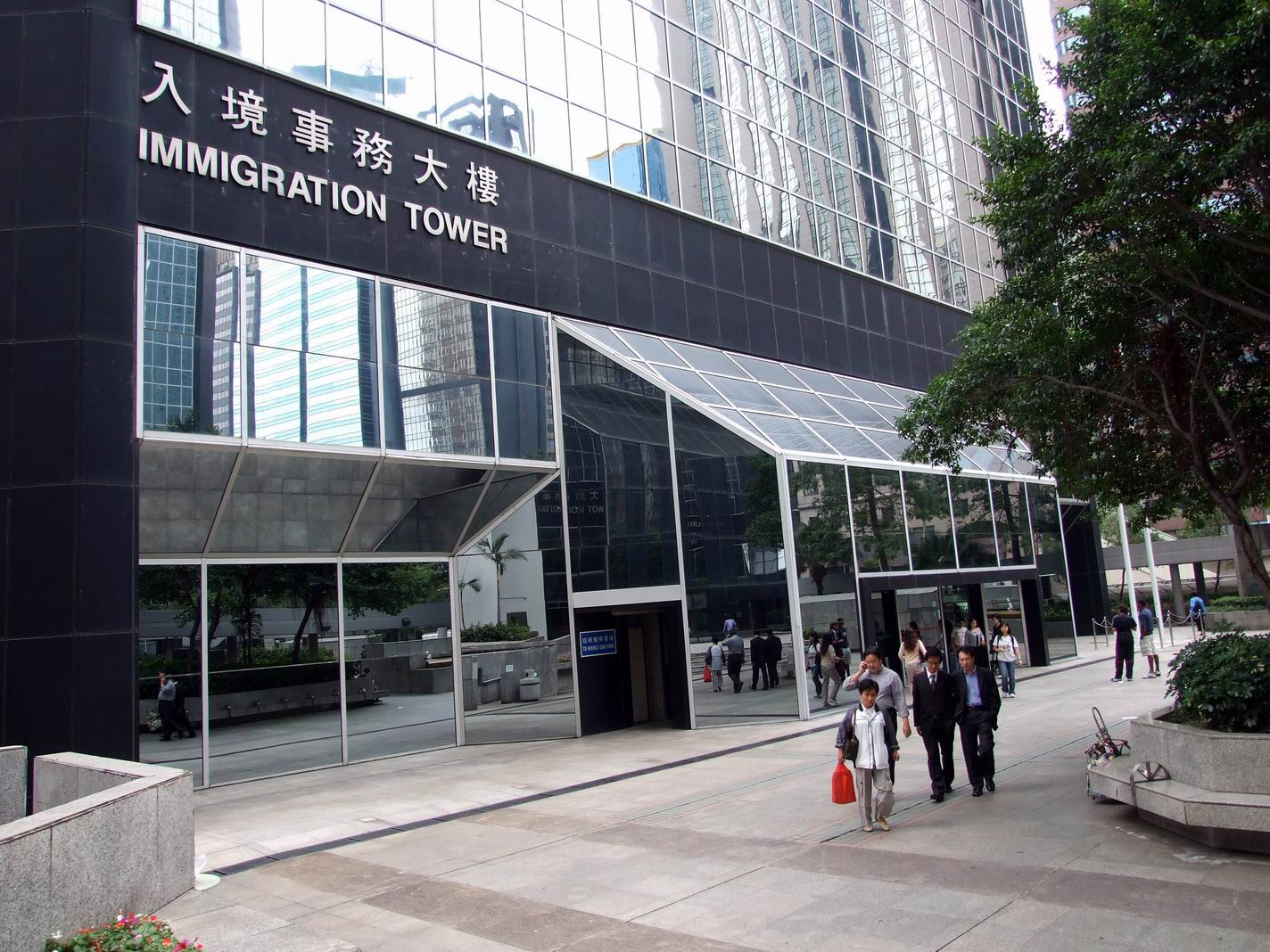 入境事務大樓入口